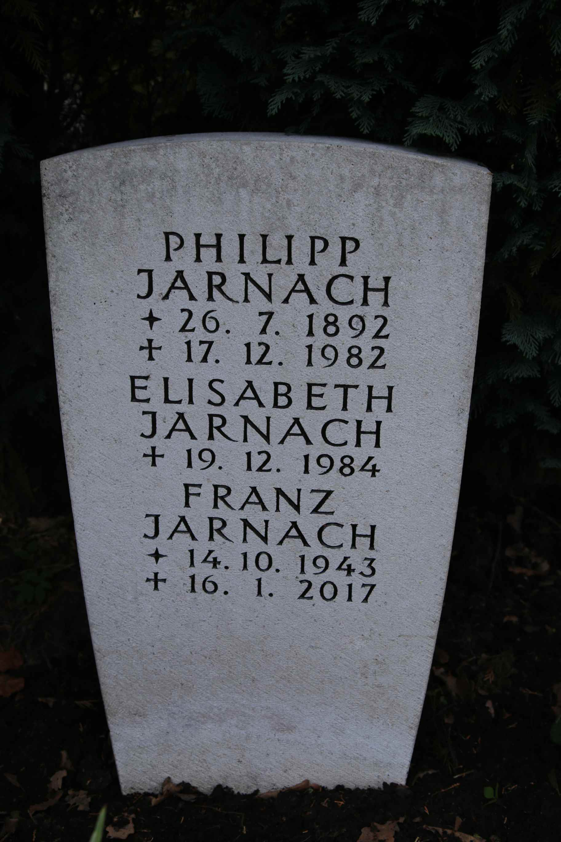 Philipp Jarnach (* 26. Juli 1892 in Noisy-le-Sec; † 17. Dezember 1982 in Börnsen) war ein deutscher Komponist und Musiklehrer. In den 1920er Jahren galt er neben Hindemith als führender Vertreter der damals modernen deutschen Musik.[1] Als „Erbteil seiner romanischen Herkunft“ bewies er „sichere Formkraft in einer selbstständigen Fortsetzung“ der von seinem Lehrer und Freund Busoni erstrebten „Klassizität“.[2] Da er bald selbst unterrichtete und diese Aufgabe sehr ernst nahm, blieb sein Werk, vorwiegend Instrumentalmusik, eher schmal. Teile der Kritik beklagten schon um 1950, der Komponist Jarnach drohe zu unrecht „vergessen“ zu werden.[3] Zu Jarnachs Schülern zählten Kurt Weill und Wilhelm Maler, die in gegensätzlichen weltanschaulichen Lagern standen.